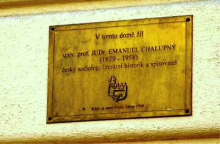 Česky: Pamětní deska JUDr.Chalupného, dům č.704 v Ústecké ul. (u Křižíkova nám.) v Táboře